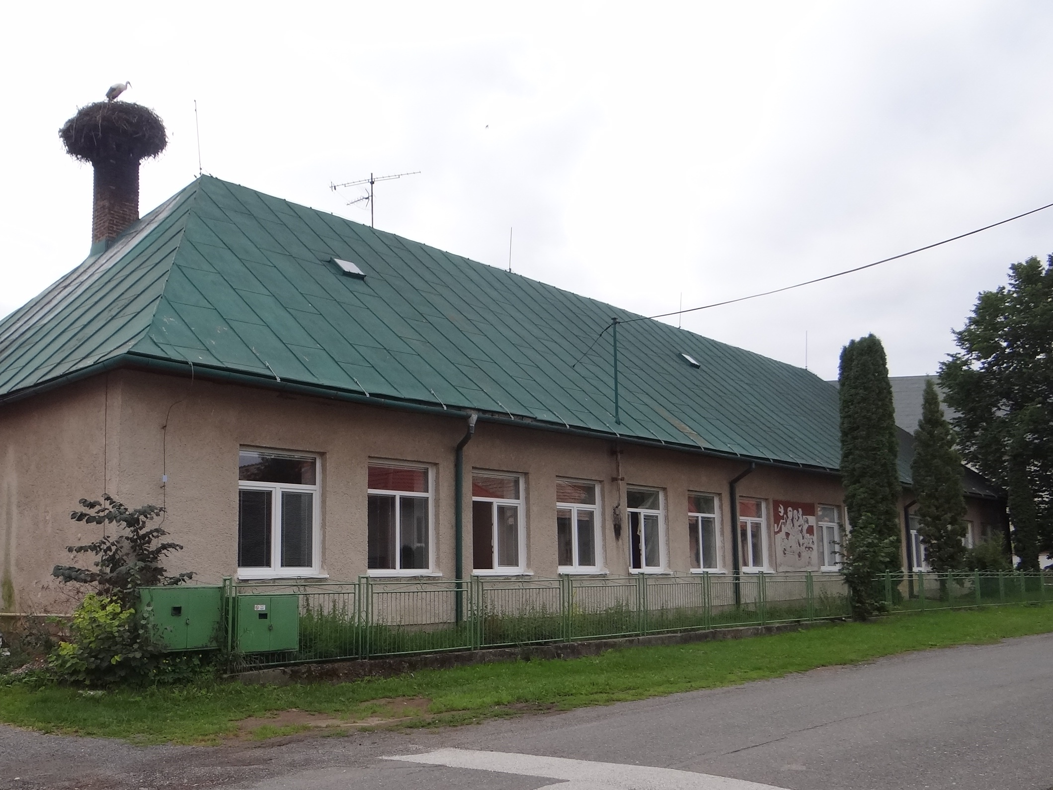 Hranovnica